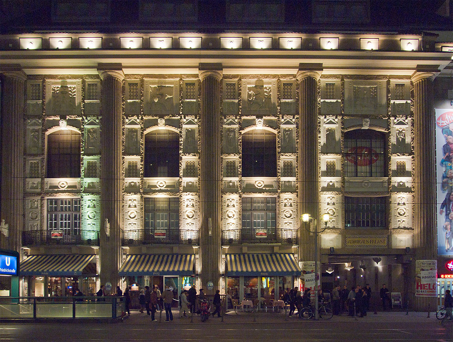 Der Admiralspalast in der Friedrichstraße in Berlin Mitte This is a photograph of an architectural monument. (O3221050-v4)